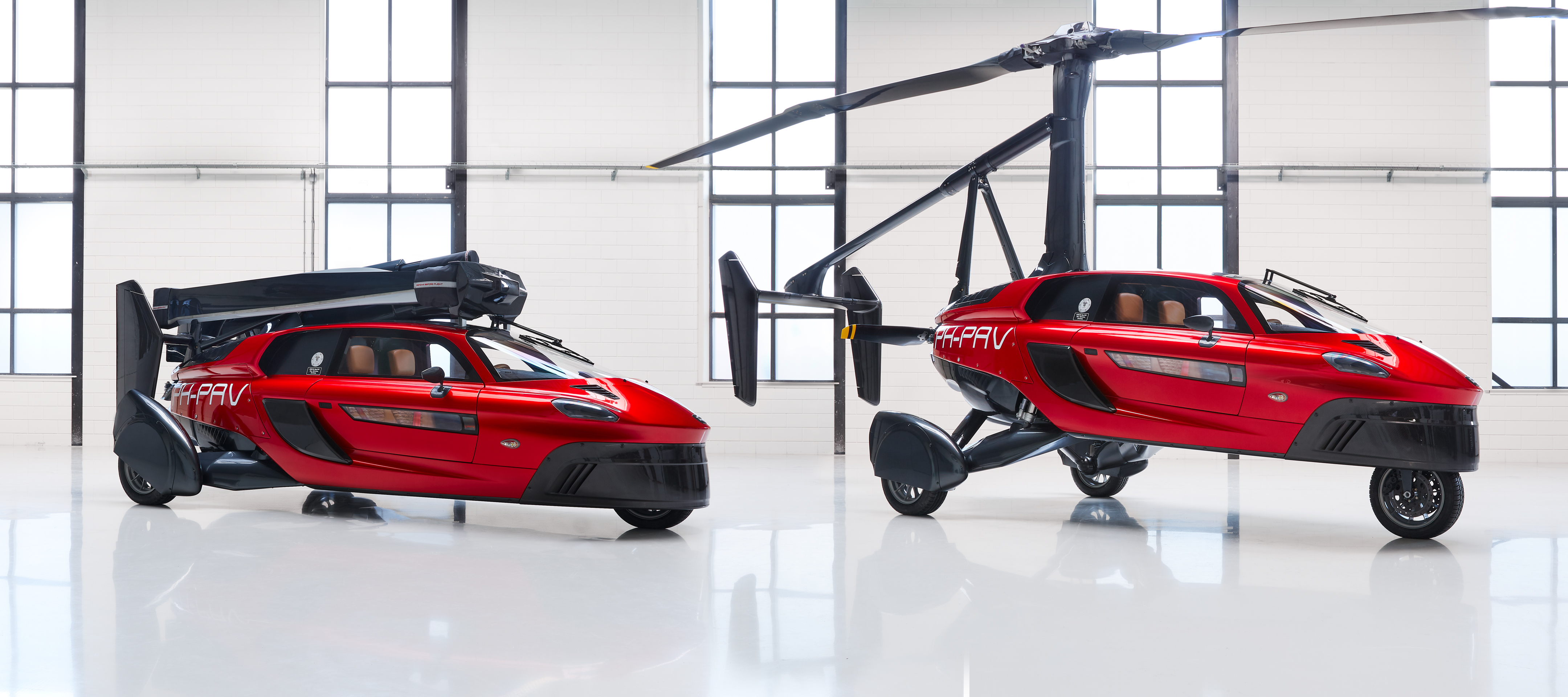 Stock photo's of the PAL-V Liberty at the headquarters of PAL-V